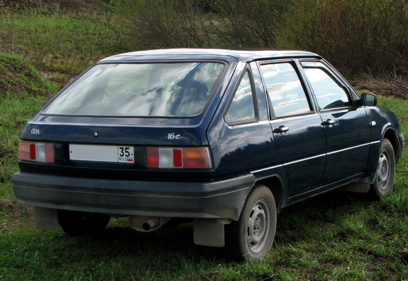 IZH 2126